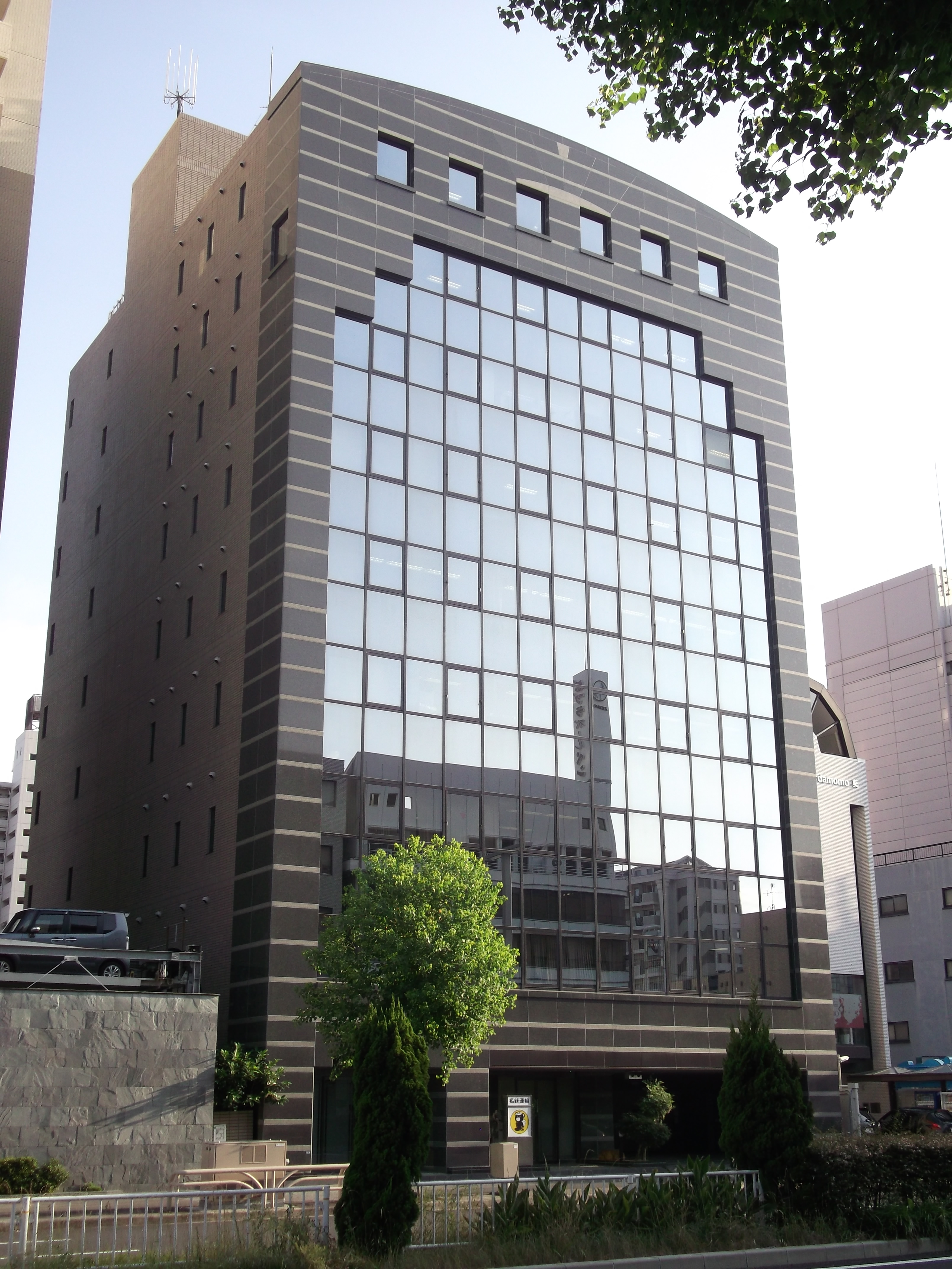 名古屋市東区葵の名鉄運輸本社を北側公道東側より撮影